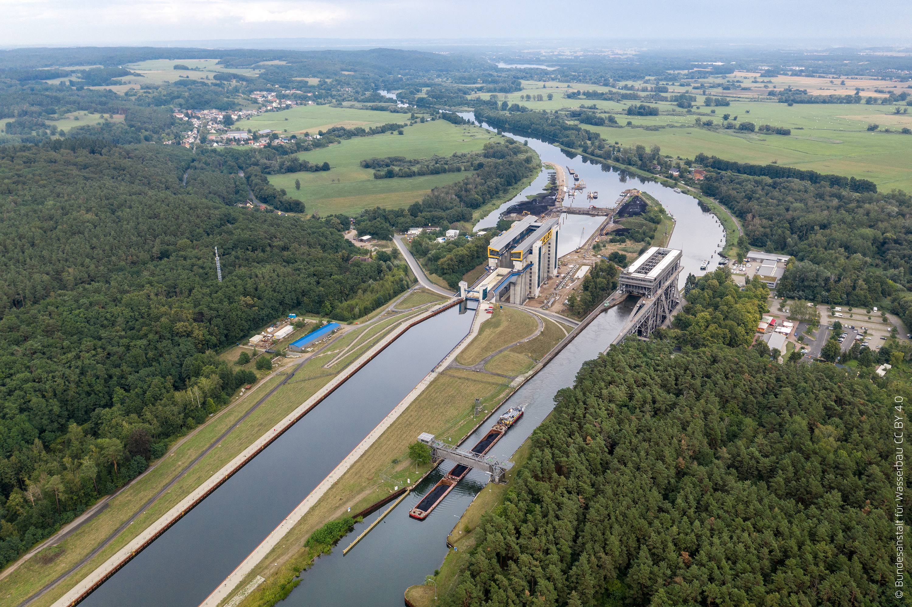 Blick Richtung Osten auf beide Hebewerke und die jeweiligen Vorhäfen. Beim oberen Vorhafen des alten Hebewerks rechts ist in 289 m Entfernung vom Hebewerk das 30 m breite Sicherheitstor (Schiff liegt genau darunter) zu erkennen. Beim neuen Hebewerk ist das Sicherheitstor nur 80 m davon entfernt, das heißt fast direkt hinter der nur 65,50 m langen Kanalbrücke.